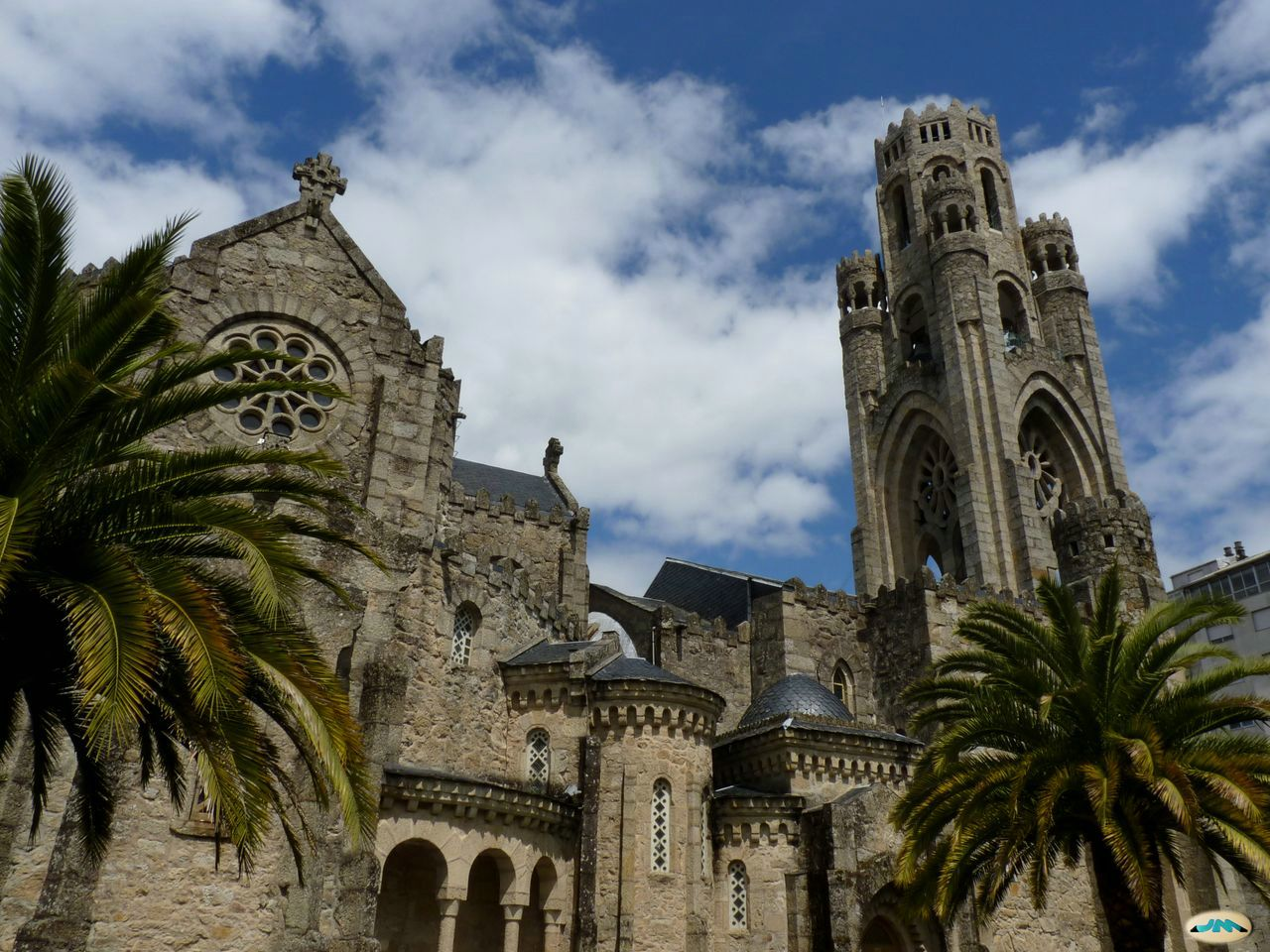 O Carballiño-Templo de la Vera Cruz5